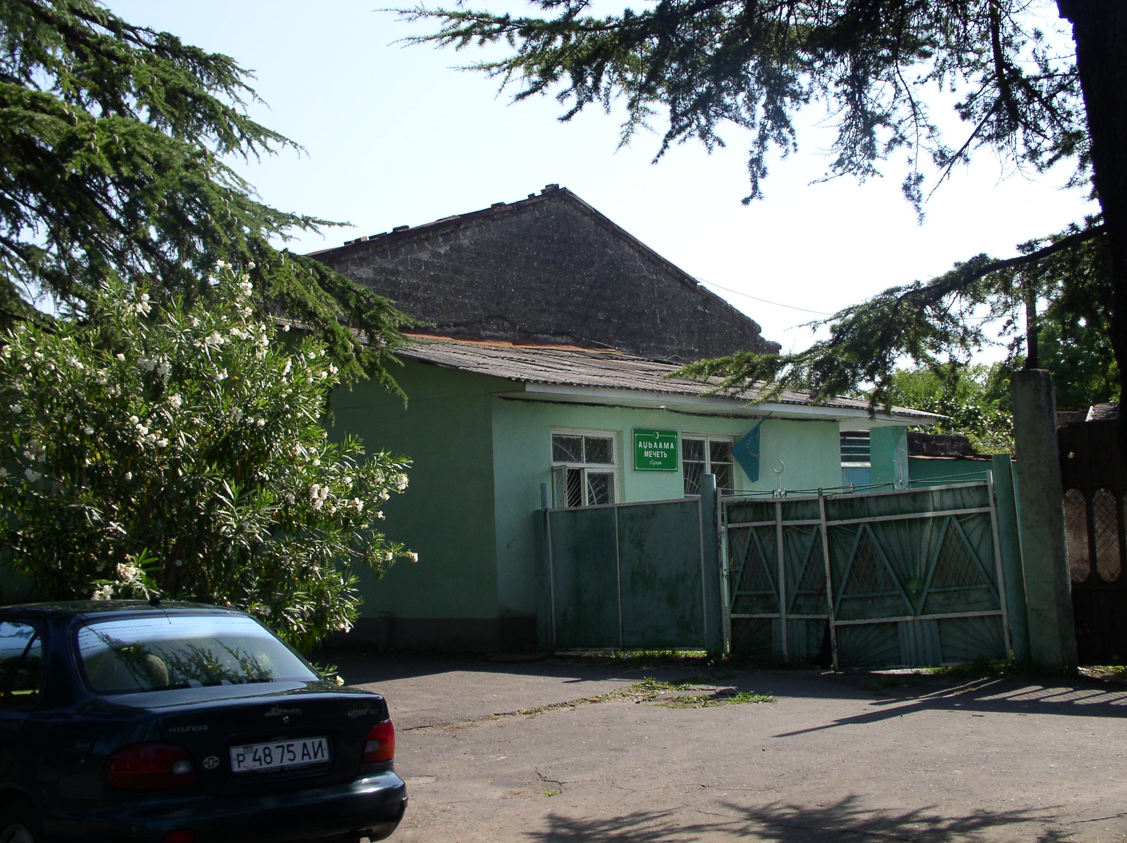 Mosque in Sukhumi, Abkhazia